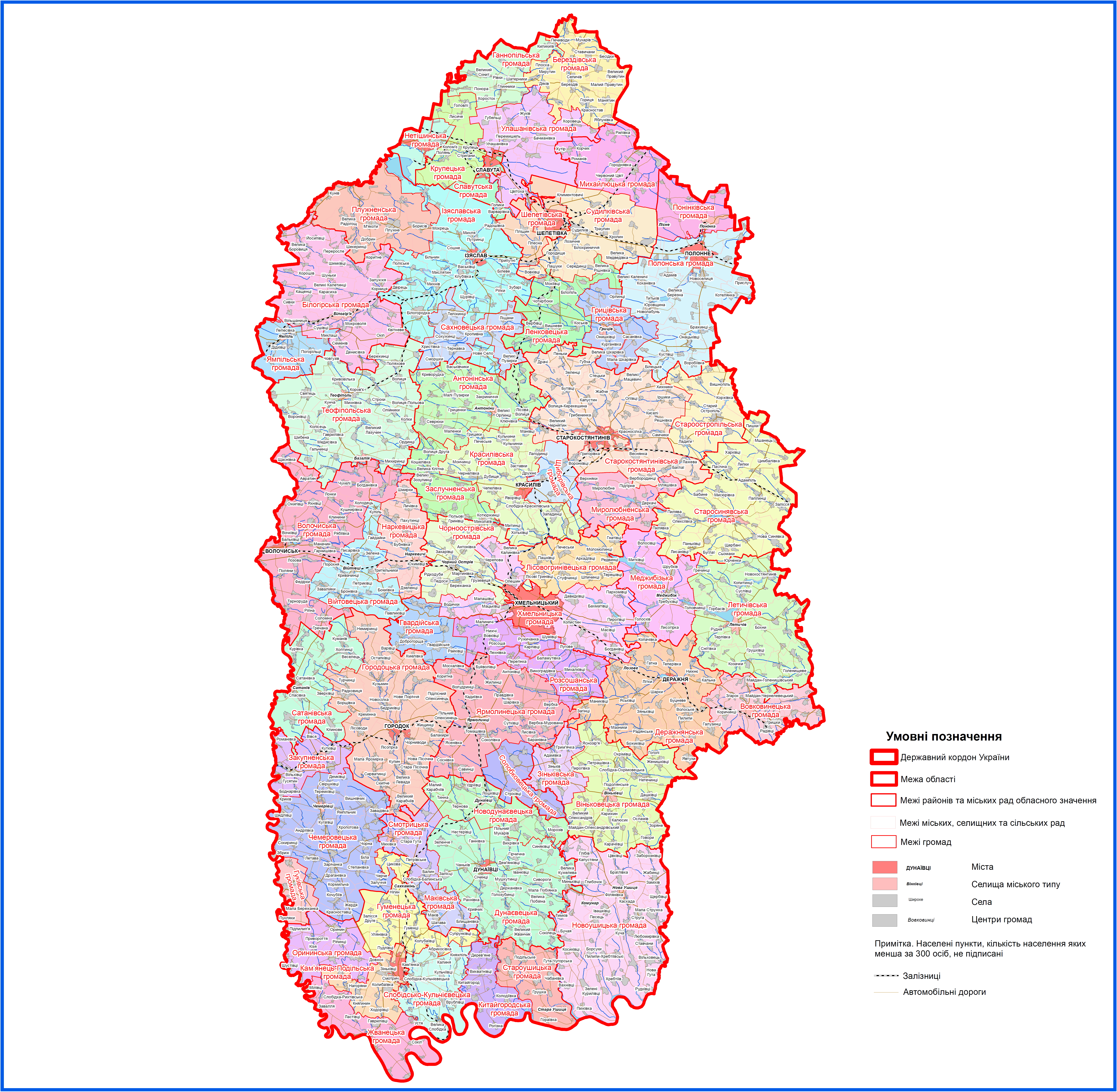 Карта територій громад Хмельницької області